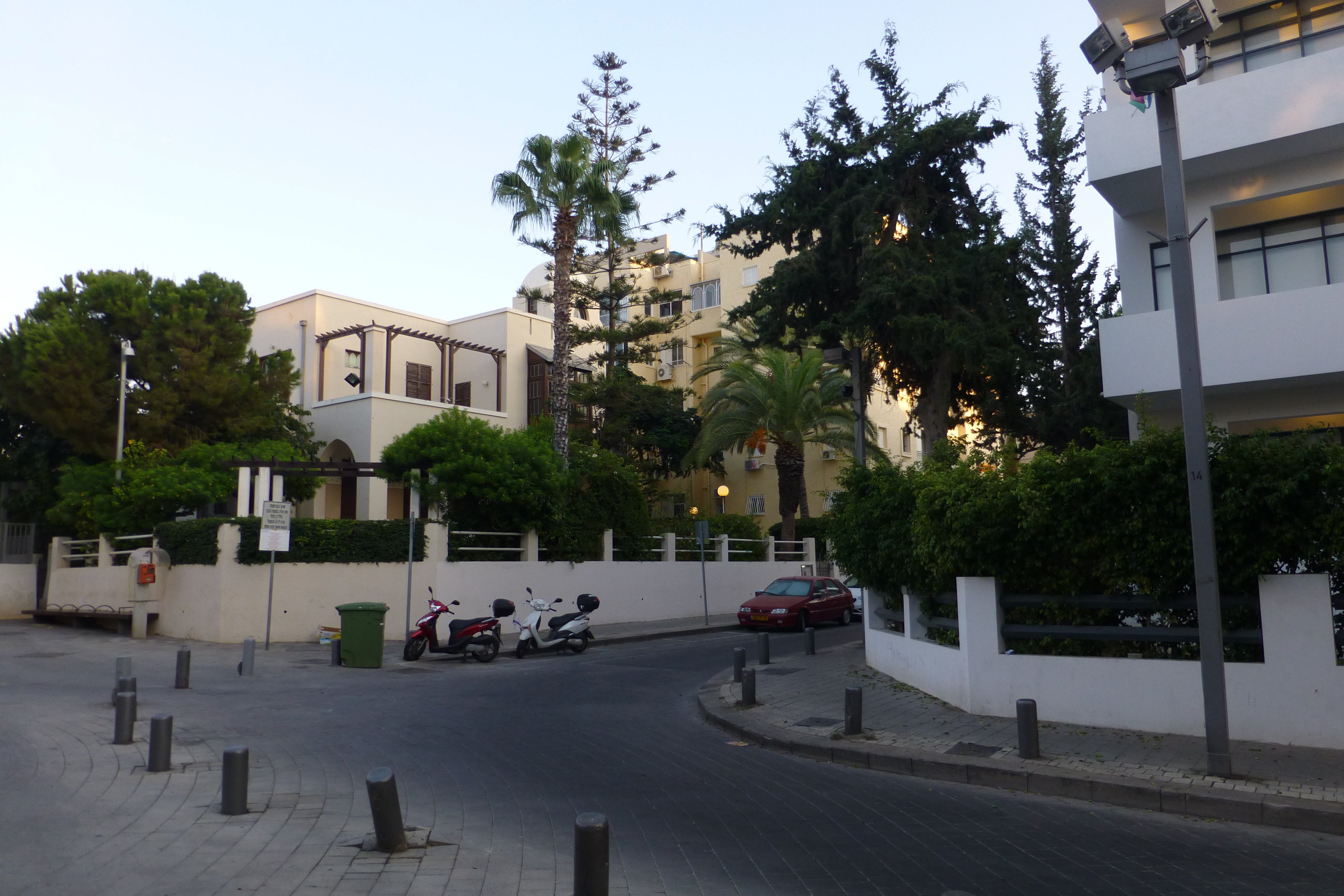 מוזיאון הבאוהאוס ברח' ביאליק בתל אביב